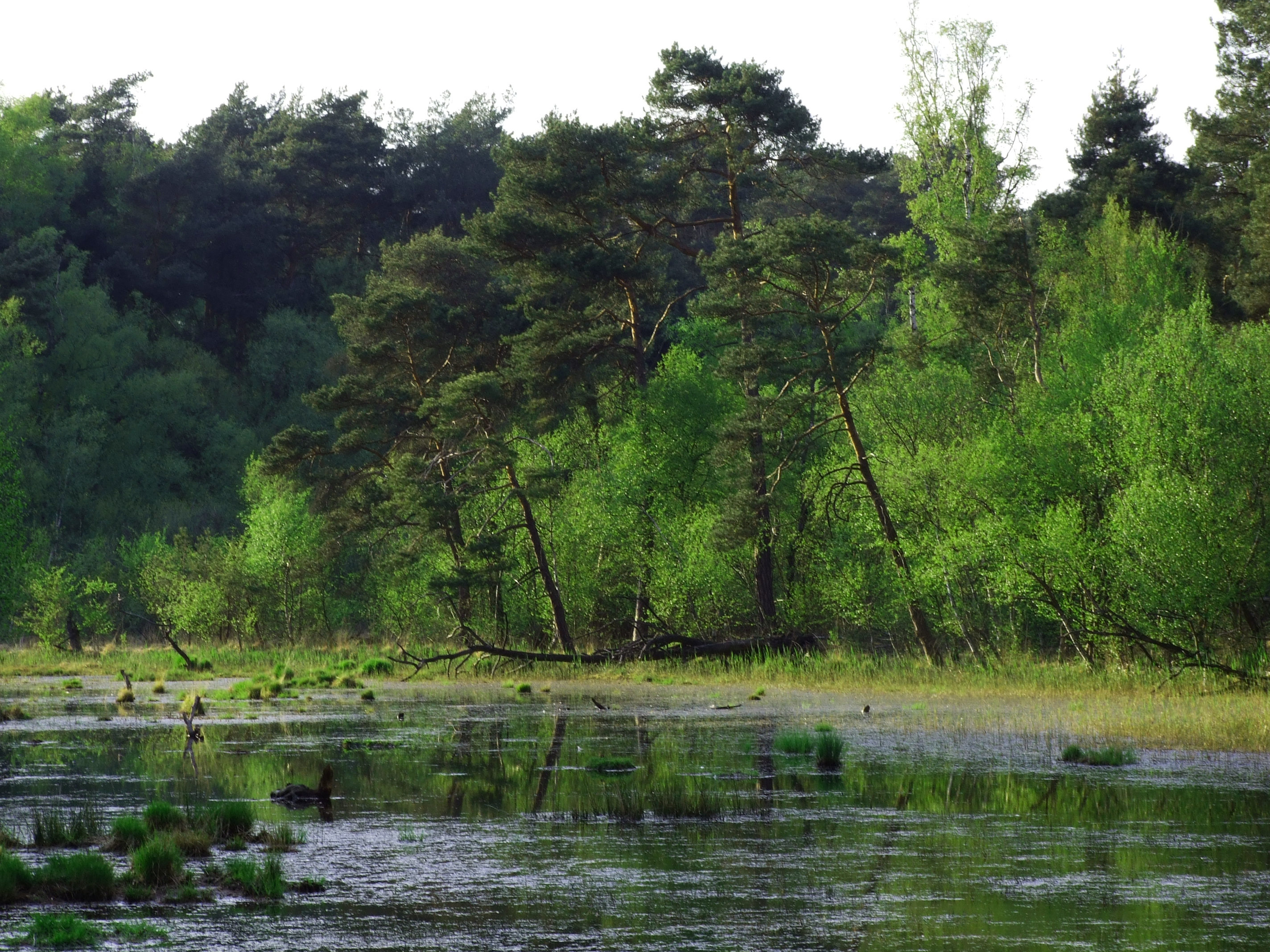 Photographie eines der Moore im ehemaligen NSG Schnepfenberg in Wesel, mittlerweile Teil des größeren Naturschutzgebiets „Diersfordter Wald“ (NSG WES-007)